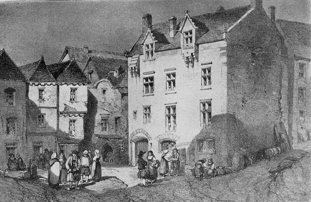 La Tour du Chatel, à Quimper (partie de la place où se déroulaient les exécutions capitales, dont celle de Marion du Faouët).